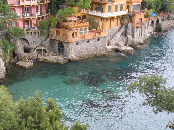 Scorcio pittoresco della baia "il cannone" attigua a PortofinoPortofino (Genova).